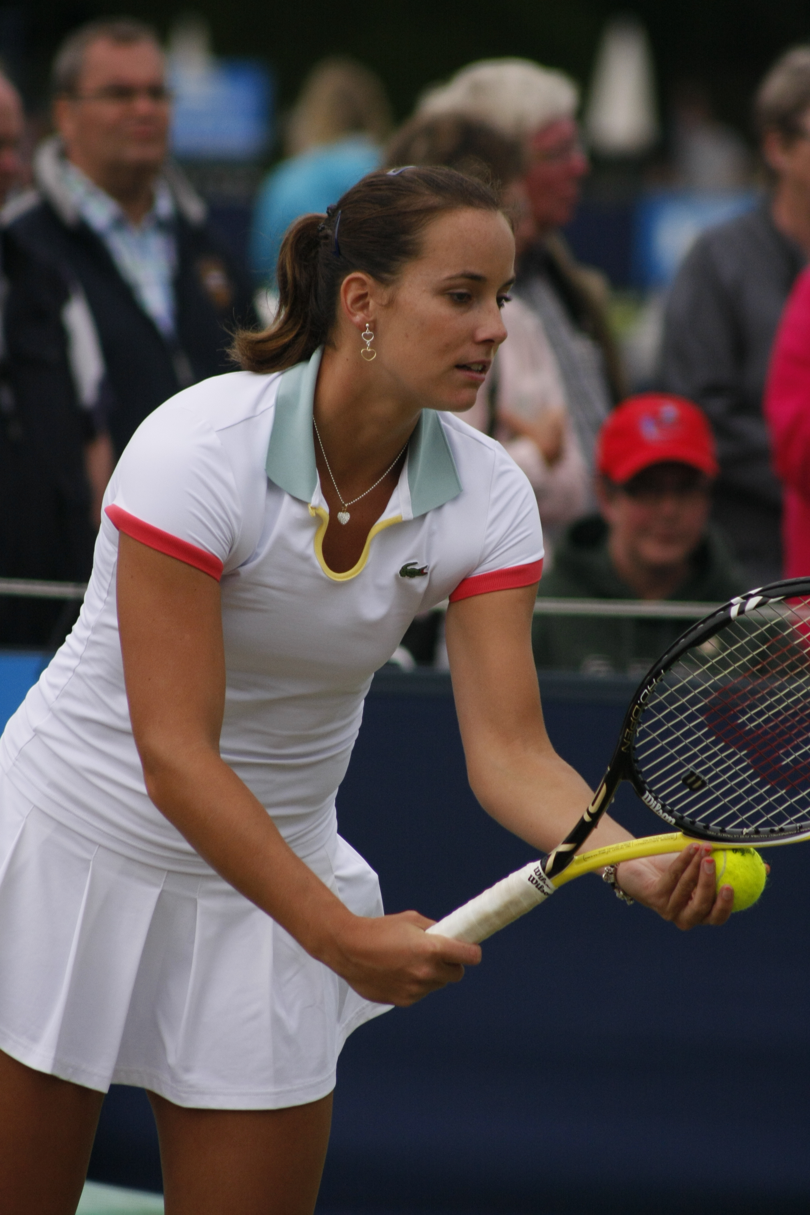 Jarmila Gajdosova, Aegon International Tennis 2011